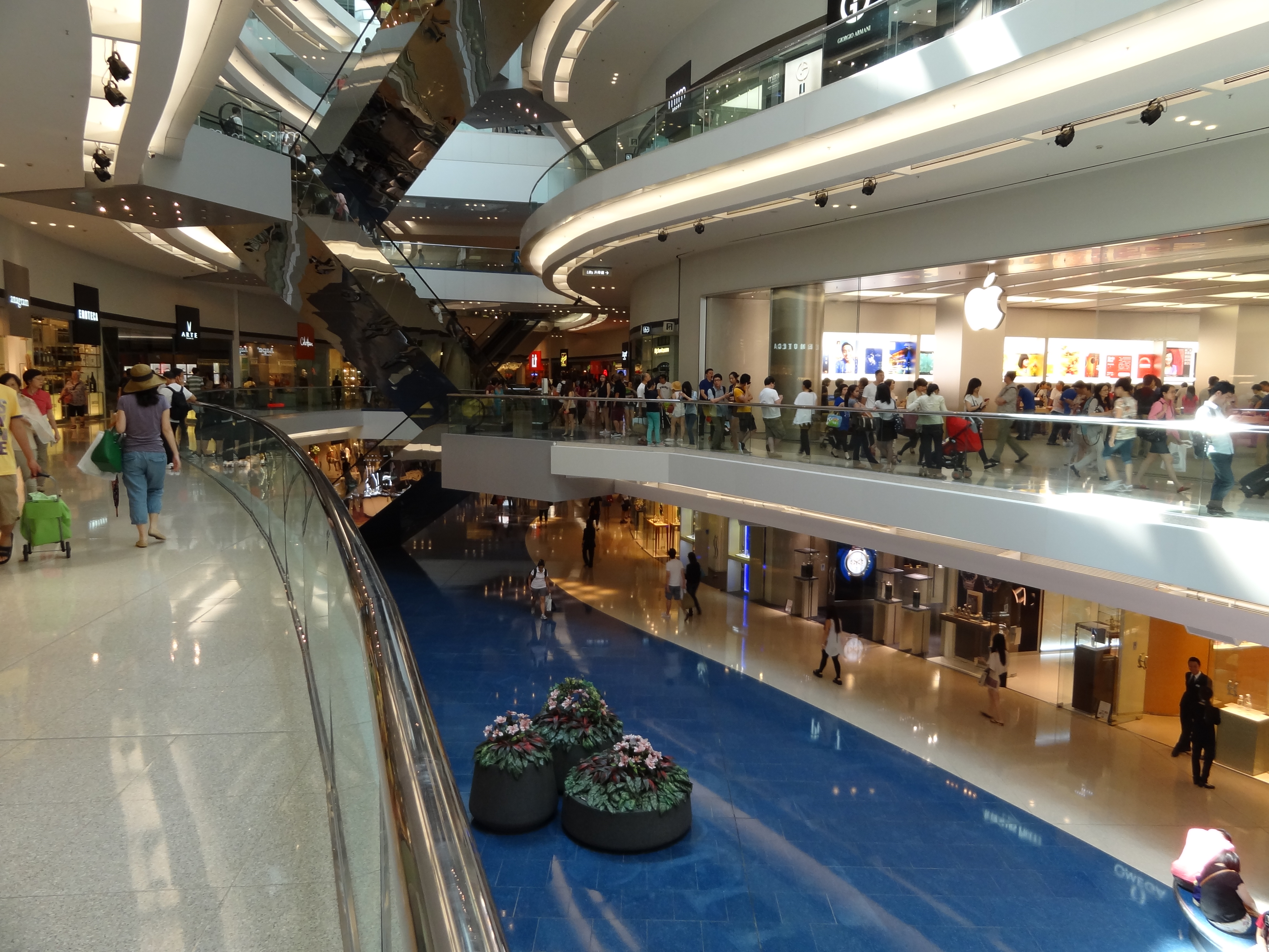 Festival Walk